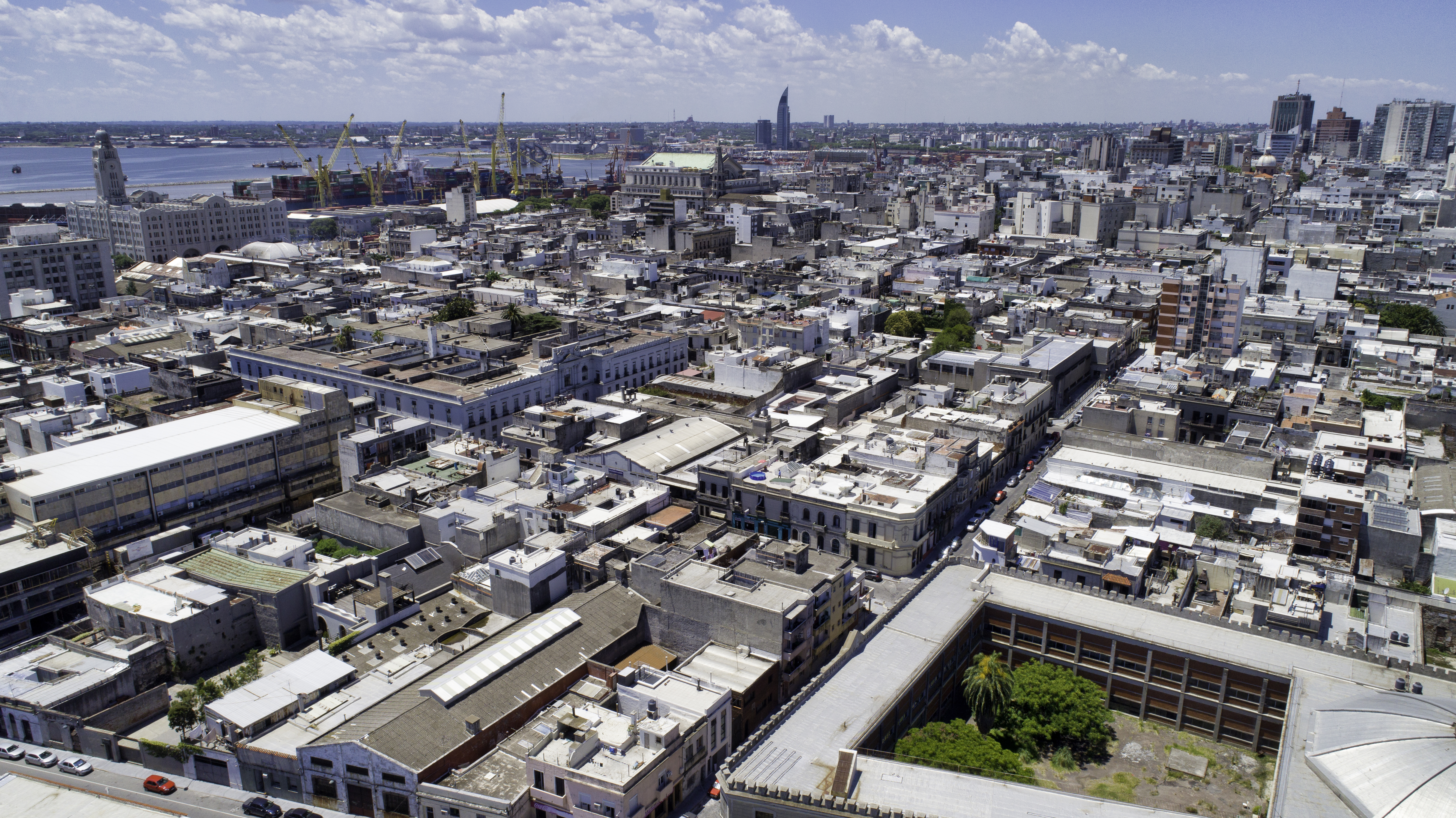 Ciudad Vieja y Puerto de Montevideo, toma aérea.